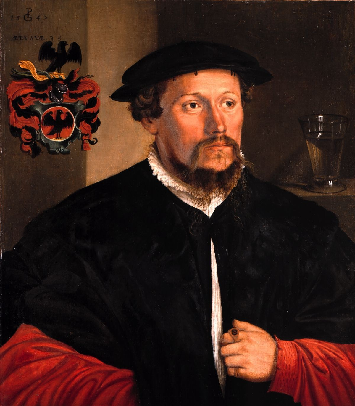 Person: Lienhard Hirschvogel, Nürnberger Kaufmann, * 21.6.1504 in Nürnberg, † zwischen Februar und Mai 1549 in Augsburg. Sohn von Bernhard Hirschvogel und Barbara, geborene Imhoff; heiratete 1535 Sabine Welser, die Tochter von Anton Welser und Felicitas Baumgartner.